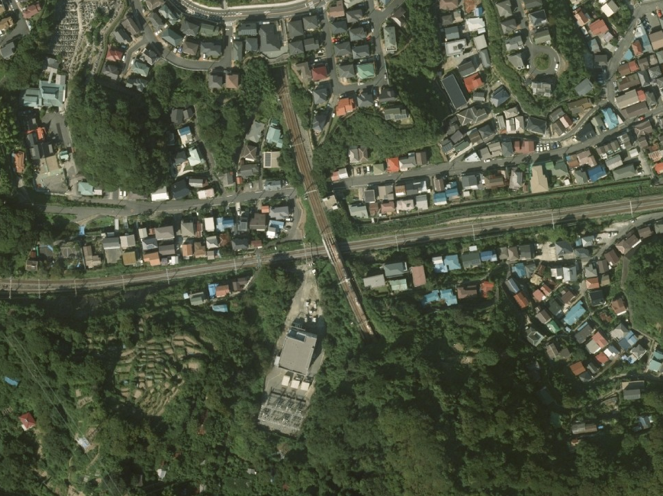 神奈川県横須賀市田浦町4丁目の横須賀線と京急本線の立体交差